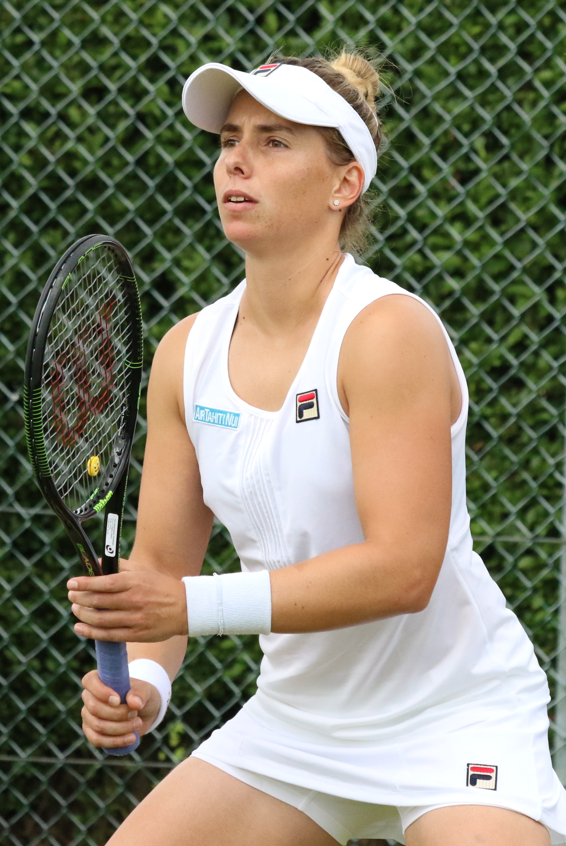 Erakovic WMQ16 (8)